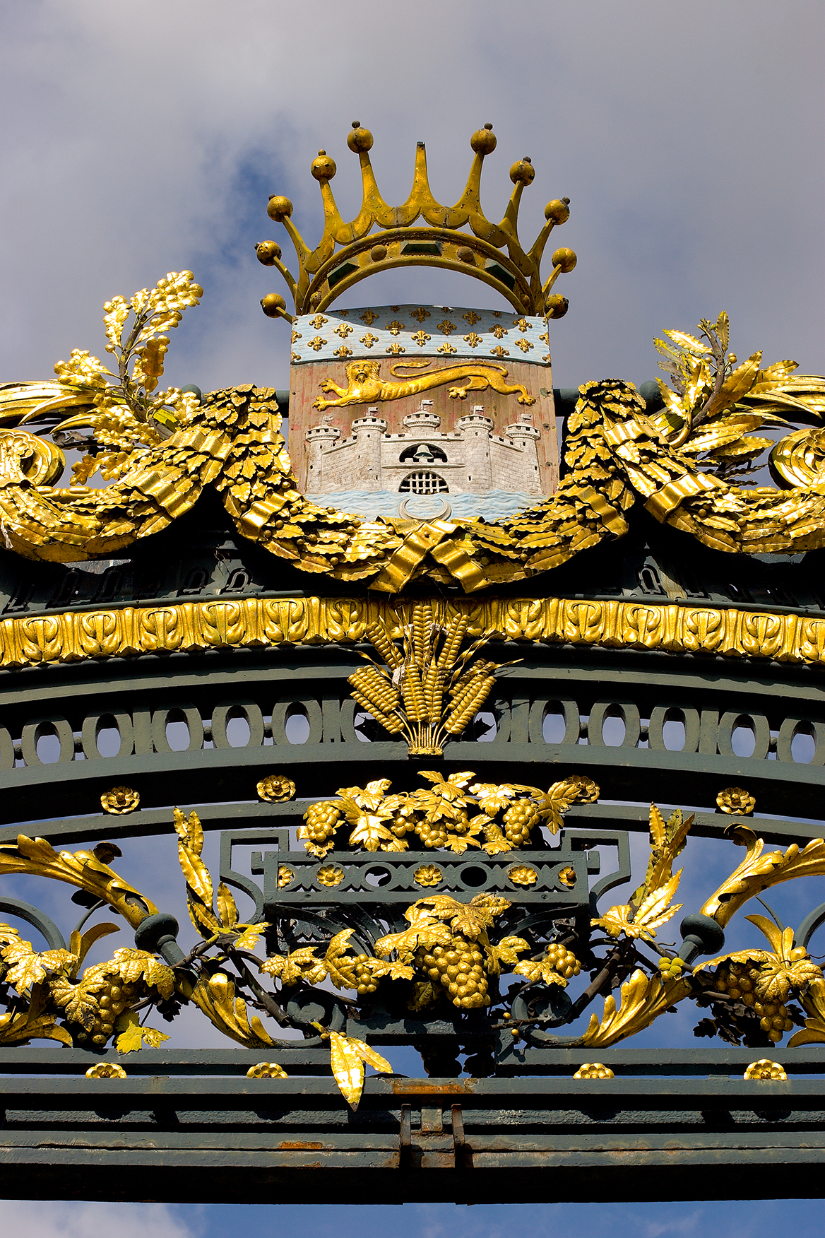 Couronne de Bordeaux, jardin de l'hotel de ville, Bordeaux, France.